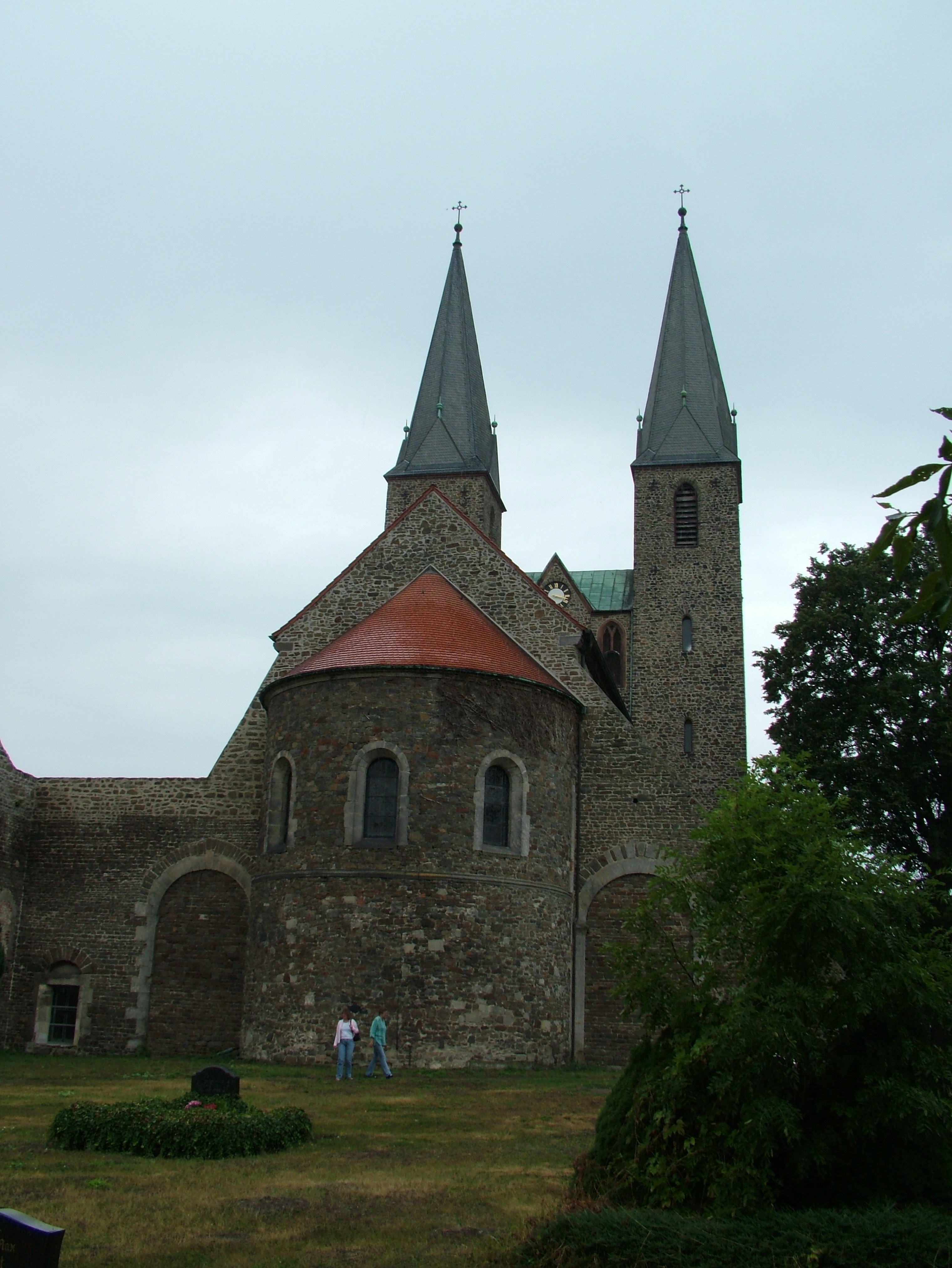 Hillersleben, Sachsen-Anhalt, Deutschland, Das Benediktinerkloster